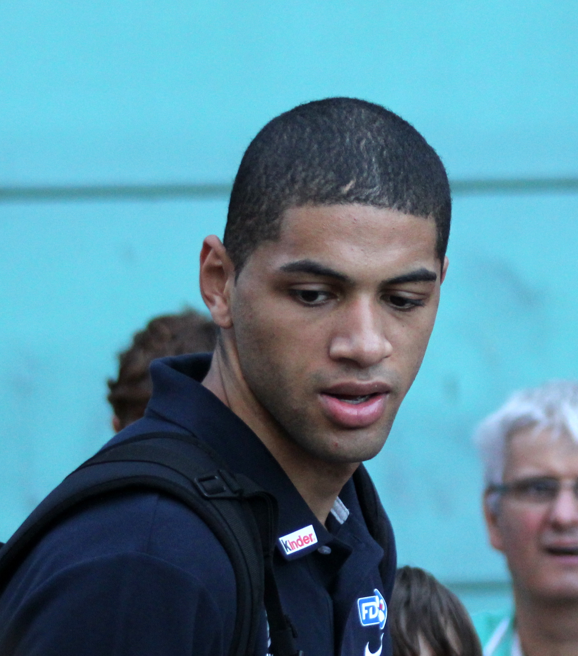 Nicolas Batum avant le match contre le Canada au palais des sports de Toulouse